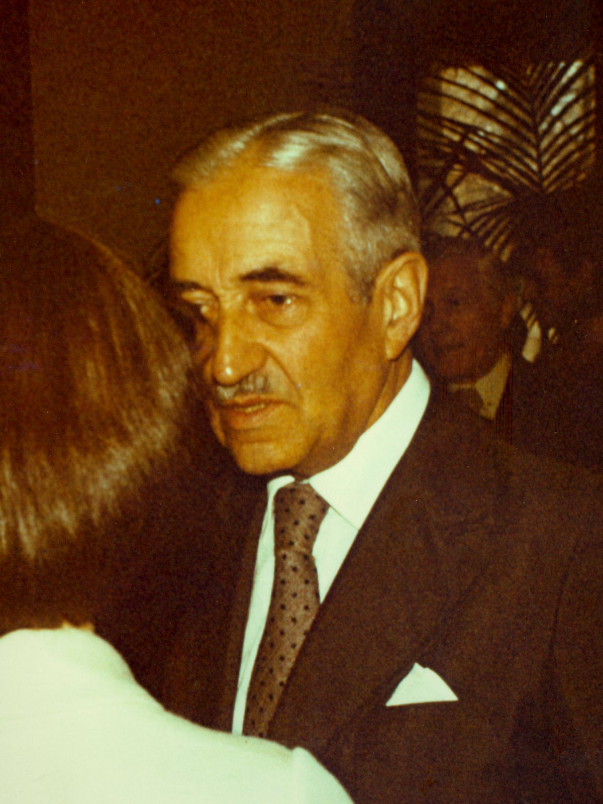 Prof. Józef Sieroszewski (1980)